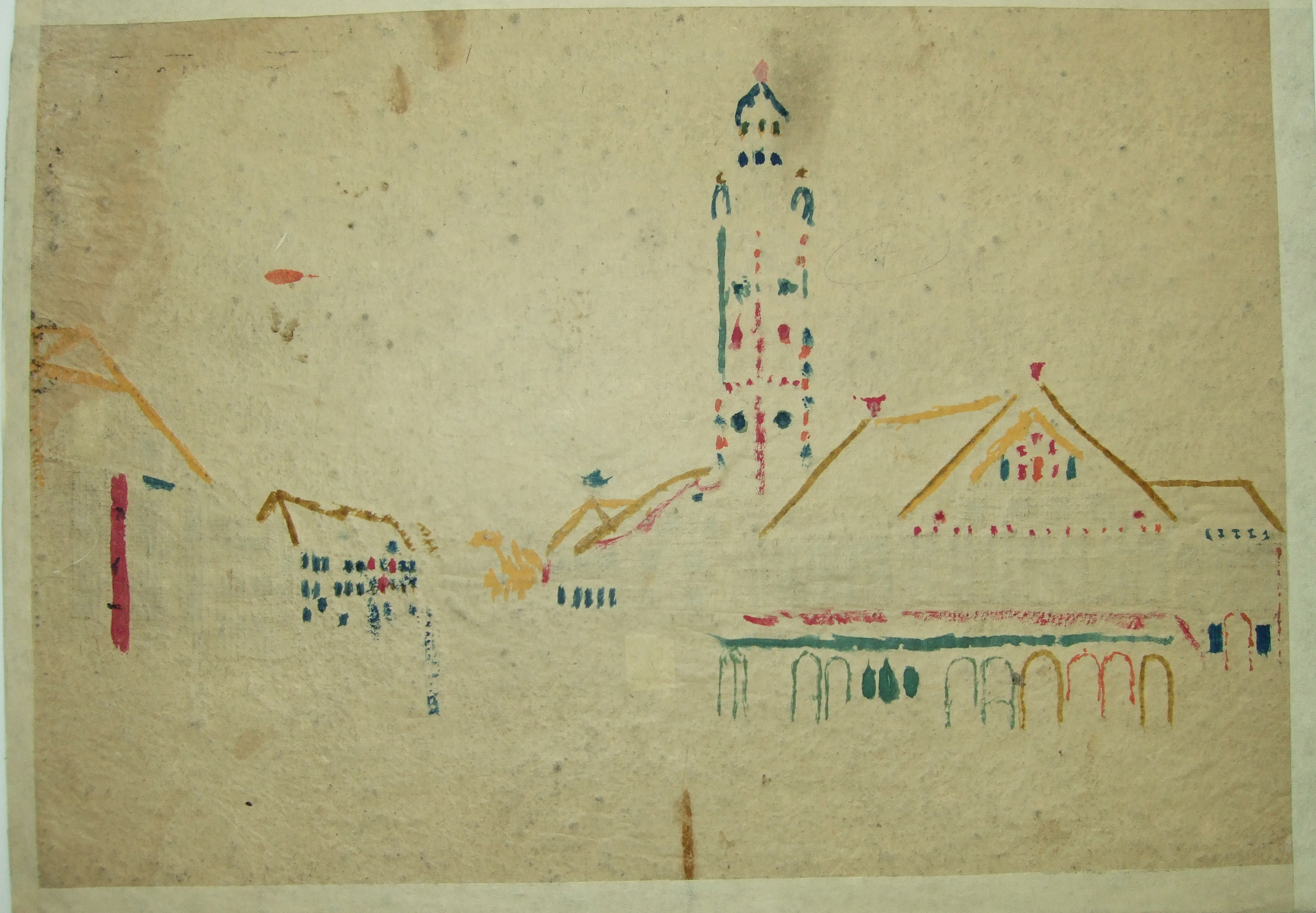 Rückseite des Guckkastenbilds Image:Ravensburg Guckkastenbild Blaserturm.jpg mit aufgeklebten Transparentpapier (für Guckkasten-Vorführungen)